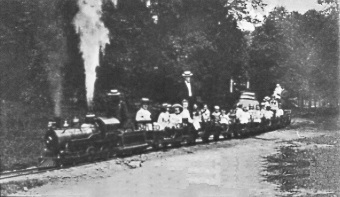 Miniature Railway at Monarch Park, Oil City, Pennsylvania built by Armitage Herschell Company.